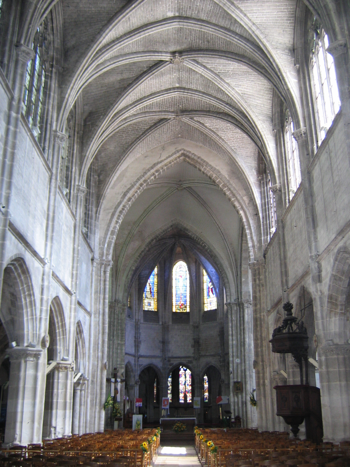 Église Saint-Pierre de Dreux, Eure-et-Loir (France).